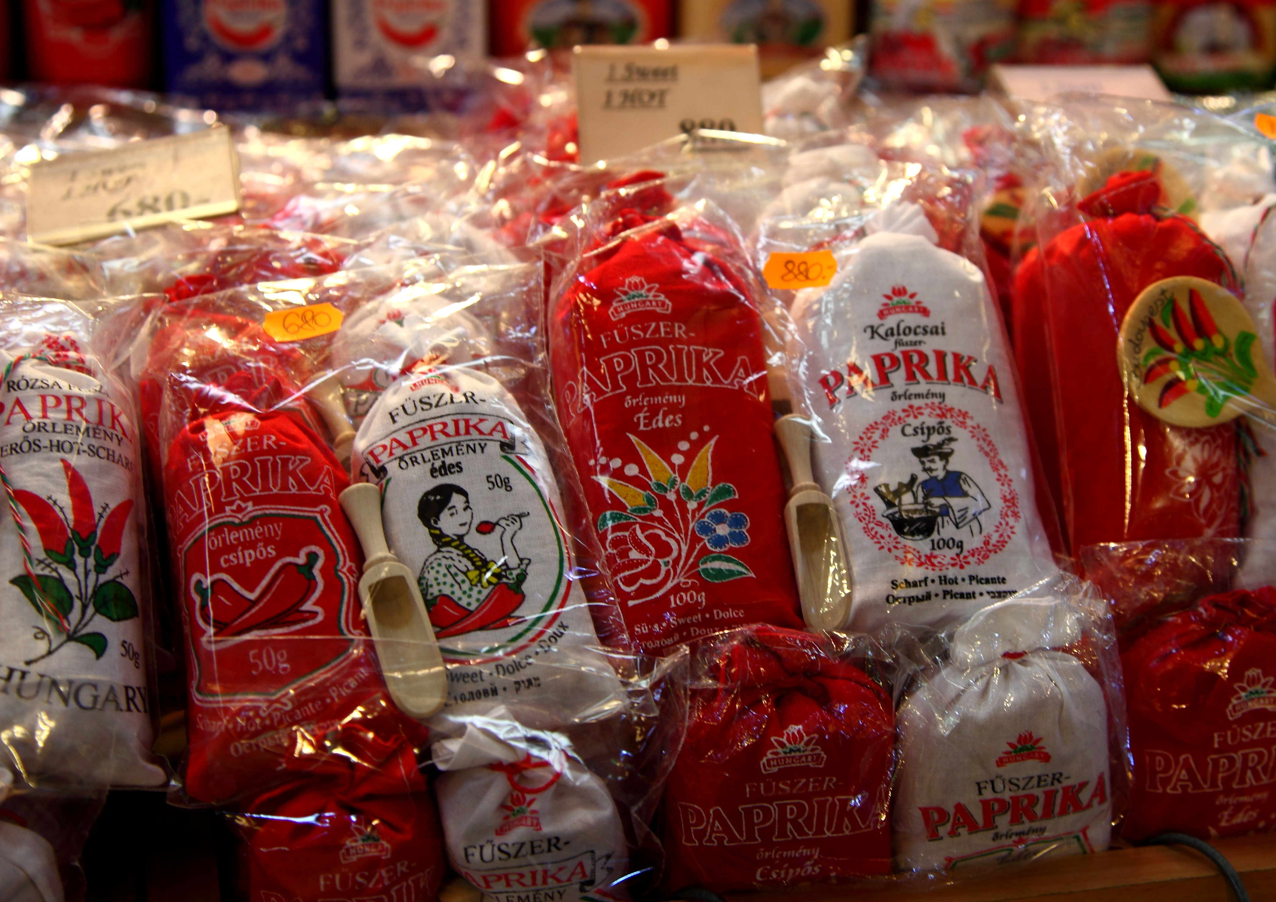 Paprika Shop